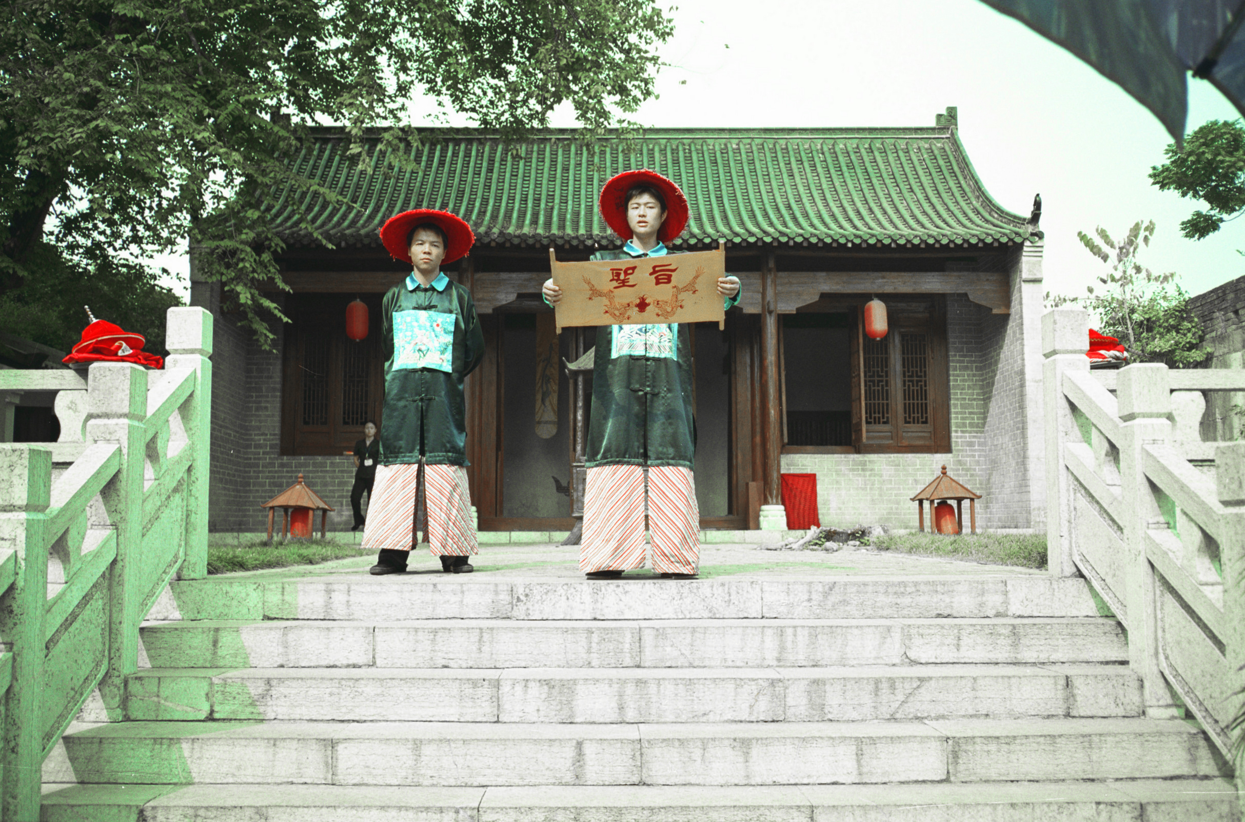 圣旨